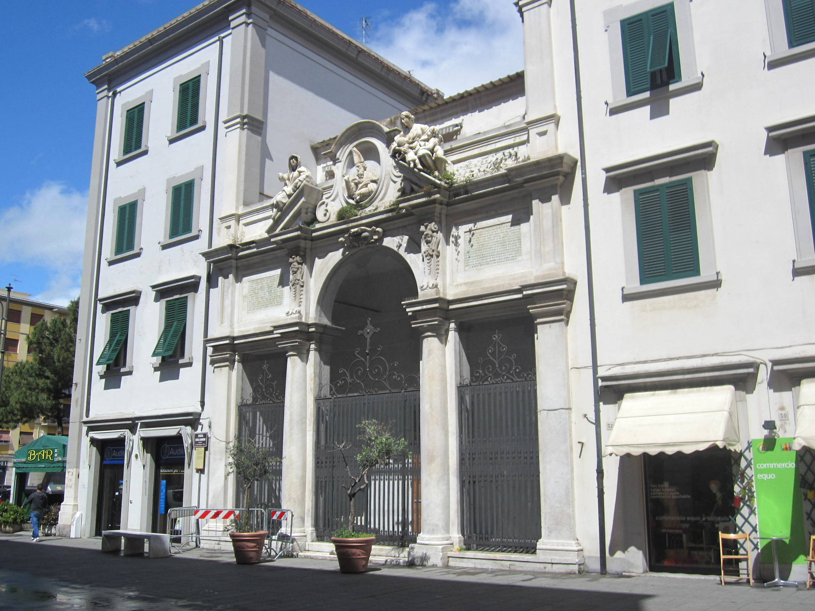 Chiesa degli Armeni o di San Gregorio Illuminatore in Via della Madonna a Livorno